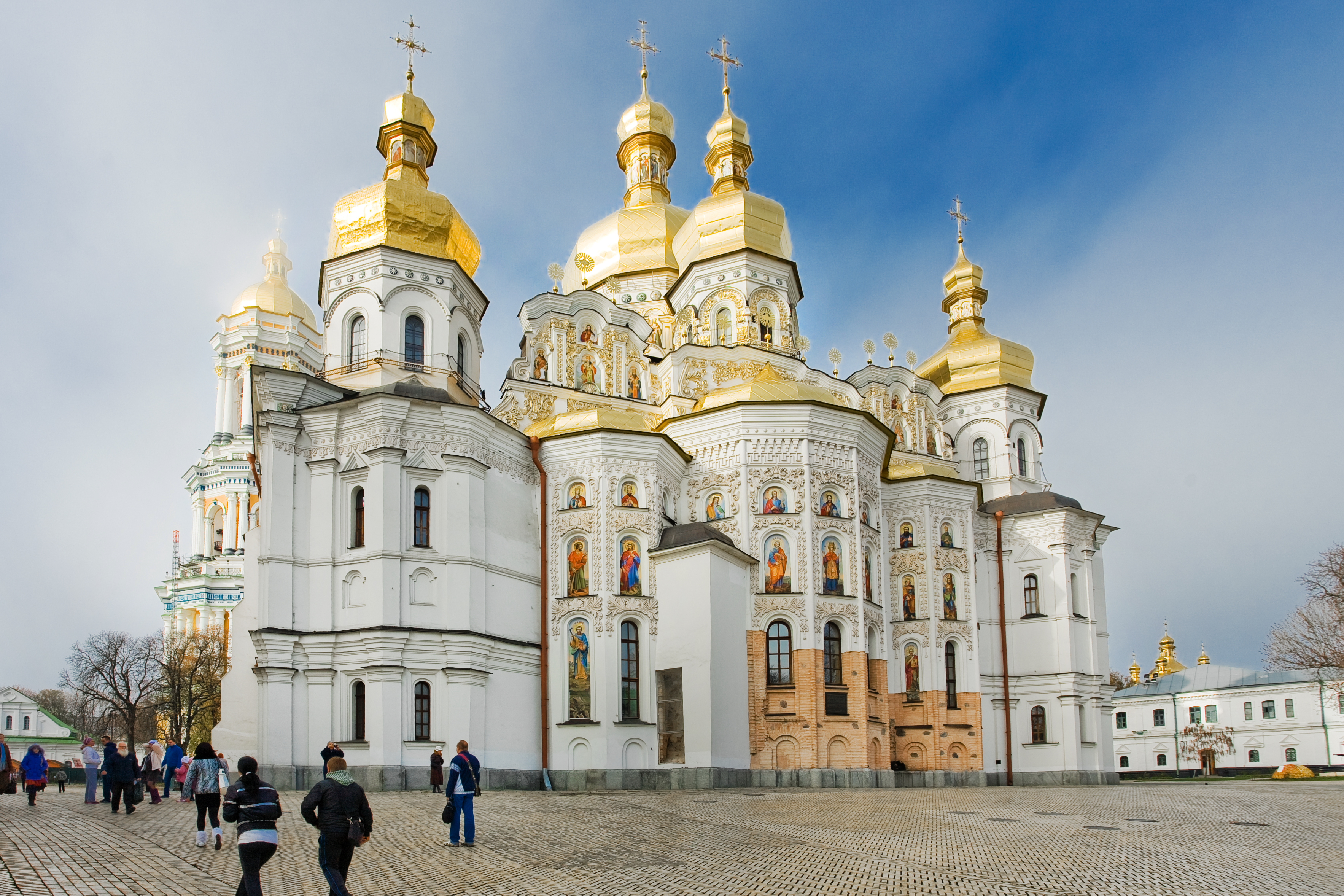 Собор Успенський Київ Лаврська вул., 21